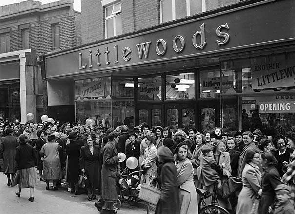 Teitl Cymraeg/Welsh title: Agor siop newydd Littlewoods yng Nghroesoswallt yn denu torfeydd Ffotograffydd/Photographer: Geoff Charles (1909-2002) Dyddiad/Date: 1/11/1950 Cyfrwng/Medium: Negydd ffilm / Film negative Cyfeiriad/Reference: (gch01096) Rhif cofnod / Record no.: 3367486 Rhagor o wybodaeth am gasgliad Geoff Charles yn Llyfrgell Genedlaethol Cymru More information about the Geoff Charles Collection at the National Library of Wales Mae ffotograffau Geoff Charles hefyd yn rhan o Broject Europeana Libraries Geoff Charles' photographs also form part of the Europeana Libraries Project